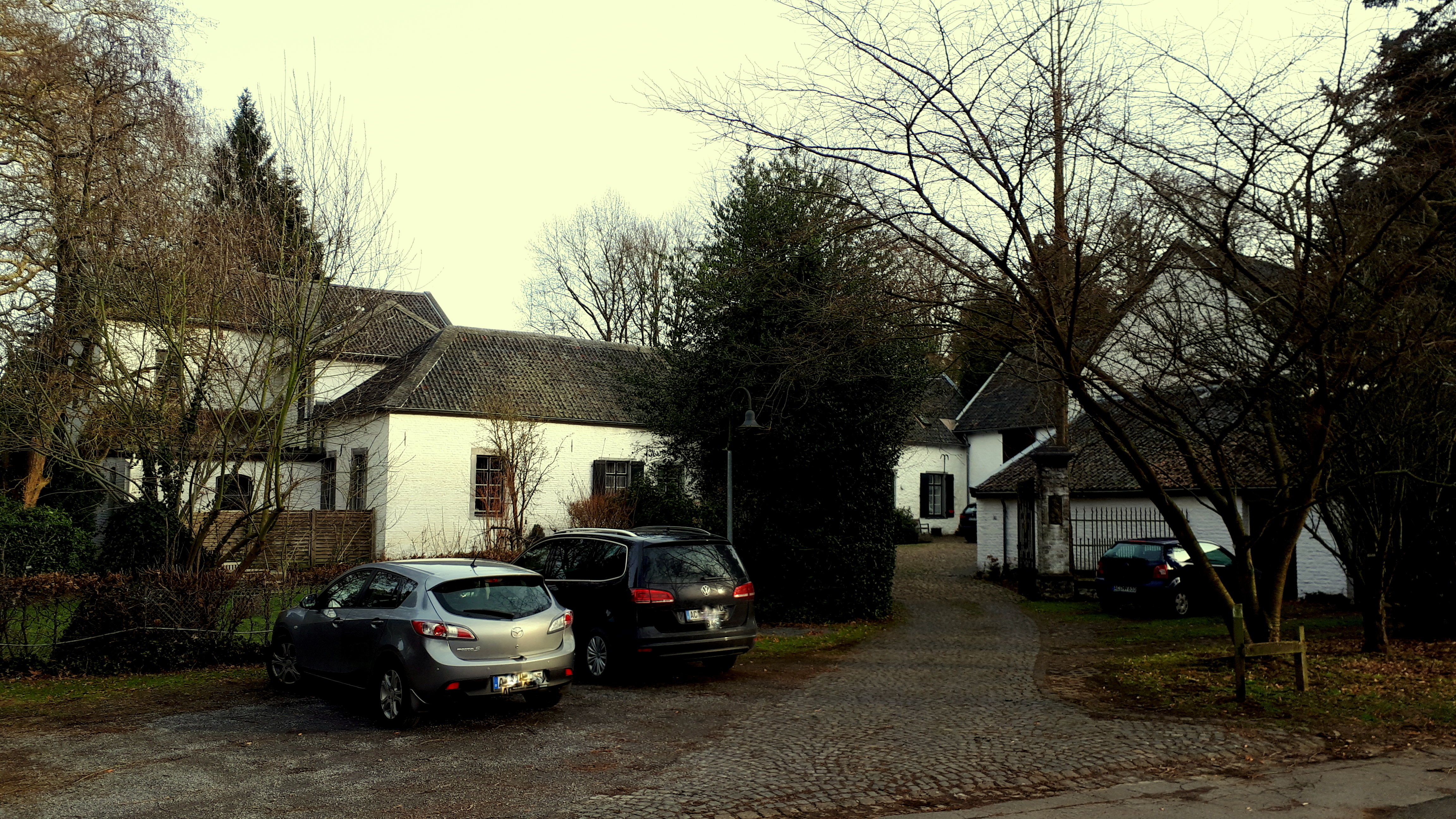 Gut Diepenbenden - Aachen; Baudenkmal in Aache-Mitte; Geburtshaus von Alfred Rethel; Landgut, Mühlenbetrieb; Fabrikstätte für Salmiak und Berliner Blau; Erstbau um 161; Neubau um 1820